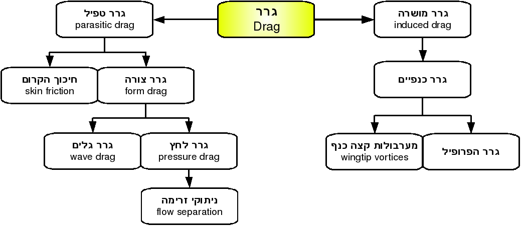 תרשים זרימה של כוחות הגרר האווירודינמיים. רישיון נוצר על ידי משתמש:Mintz l